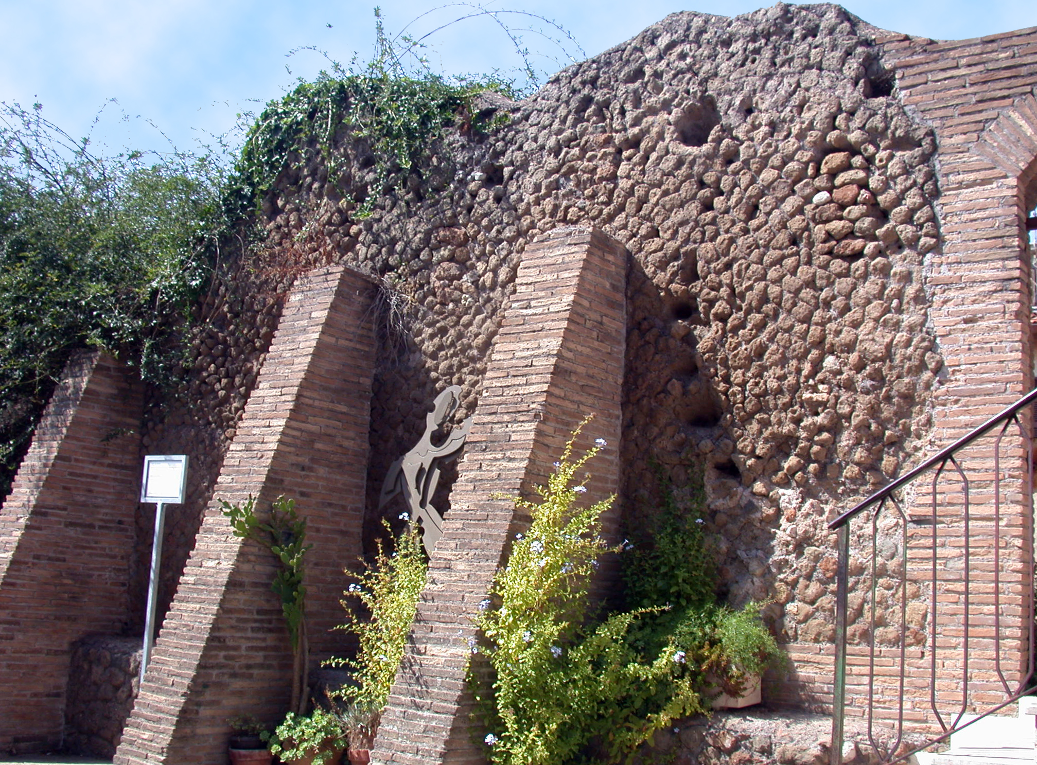 Italia, Lazio, provincia di Roma, Ardea: resti del tempio di Giunone (?) sull'acropoli, presso l'attuale Municipio (muro in opera incerta